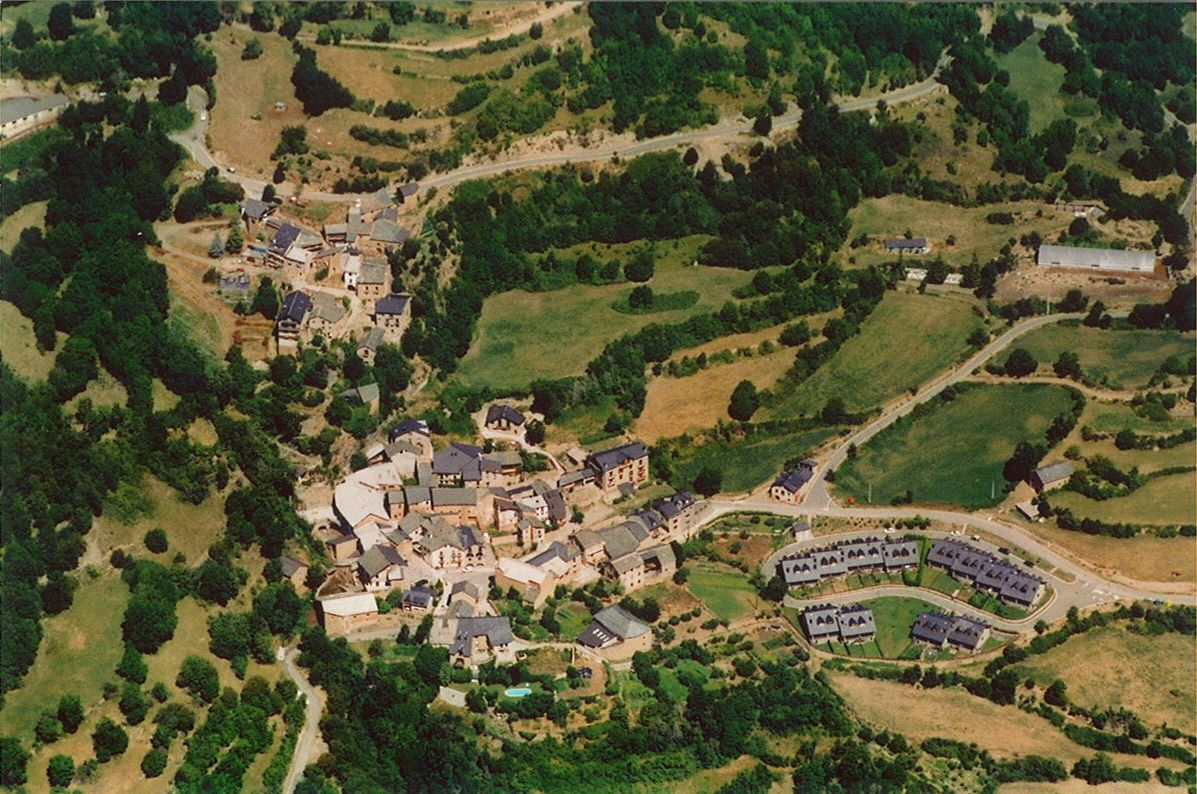 Vista aèria de la població d'Olp, al Pallars Sobirà